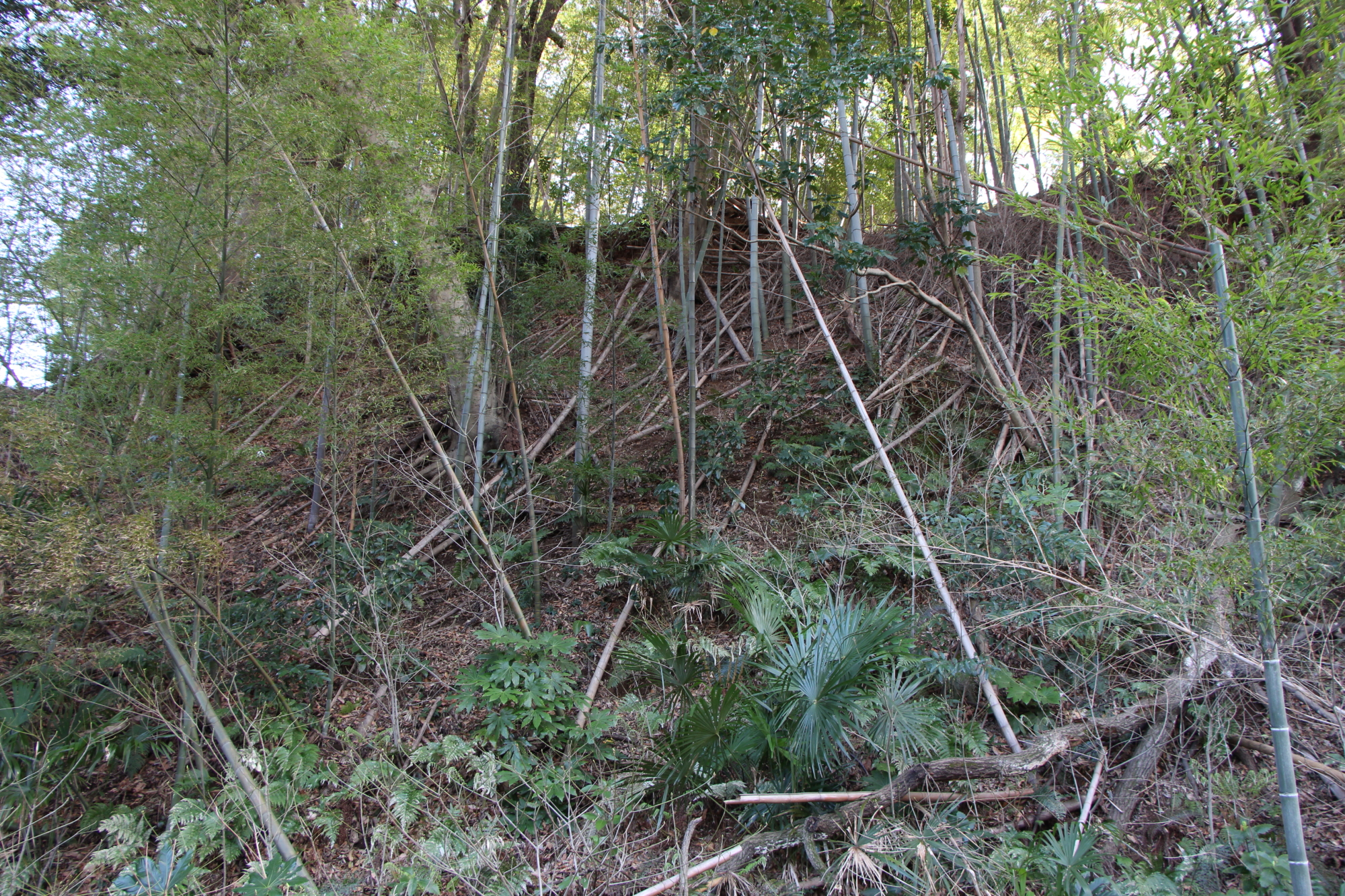 北側から主郭の崖を臨む